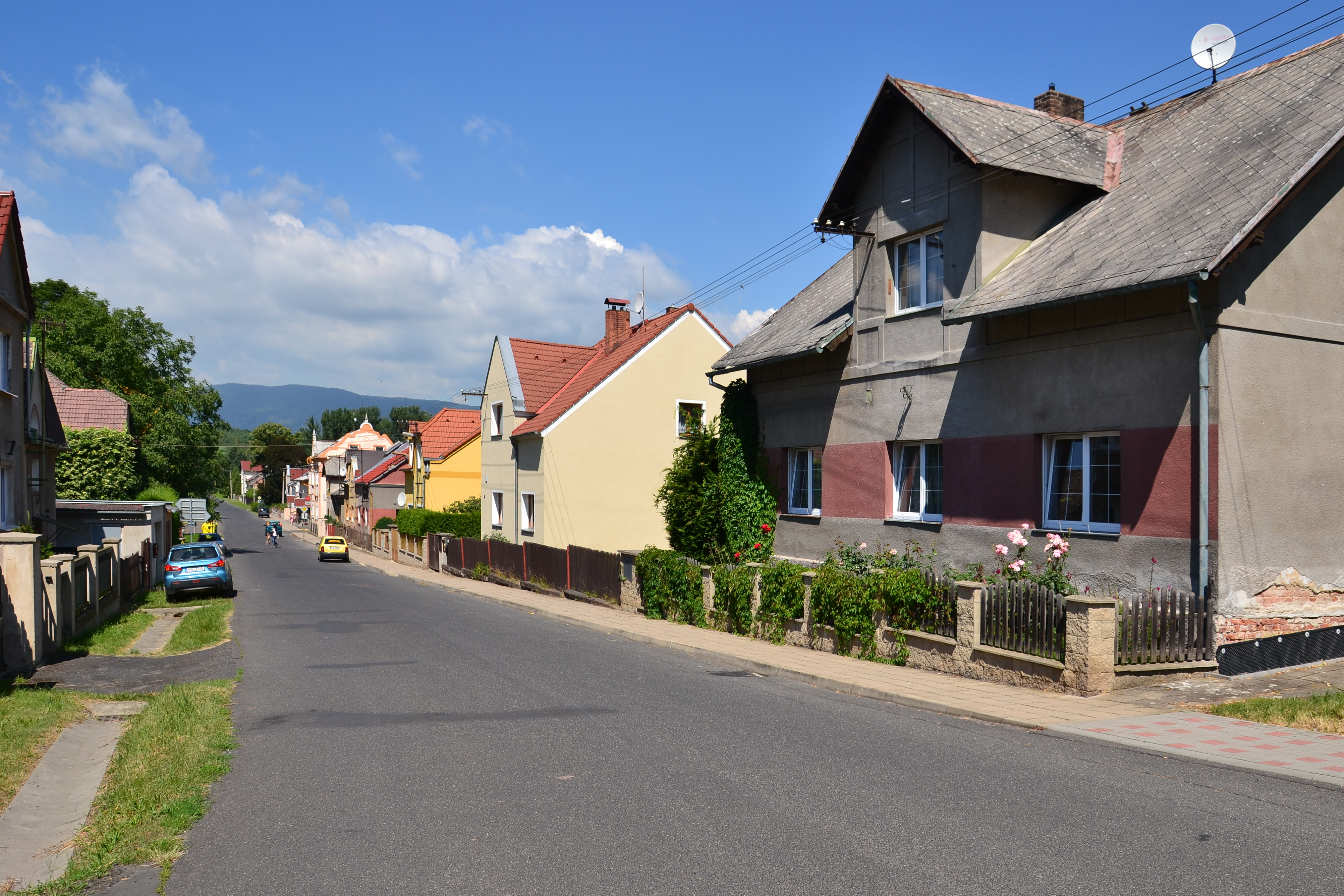 Hlavní ulice